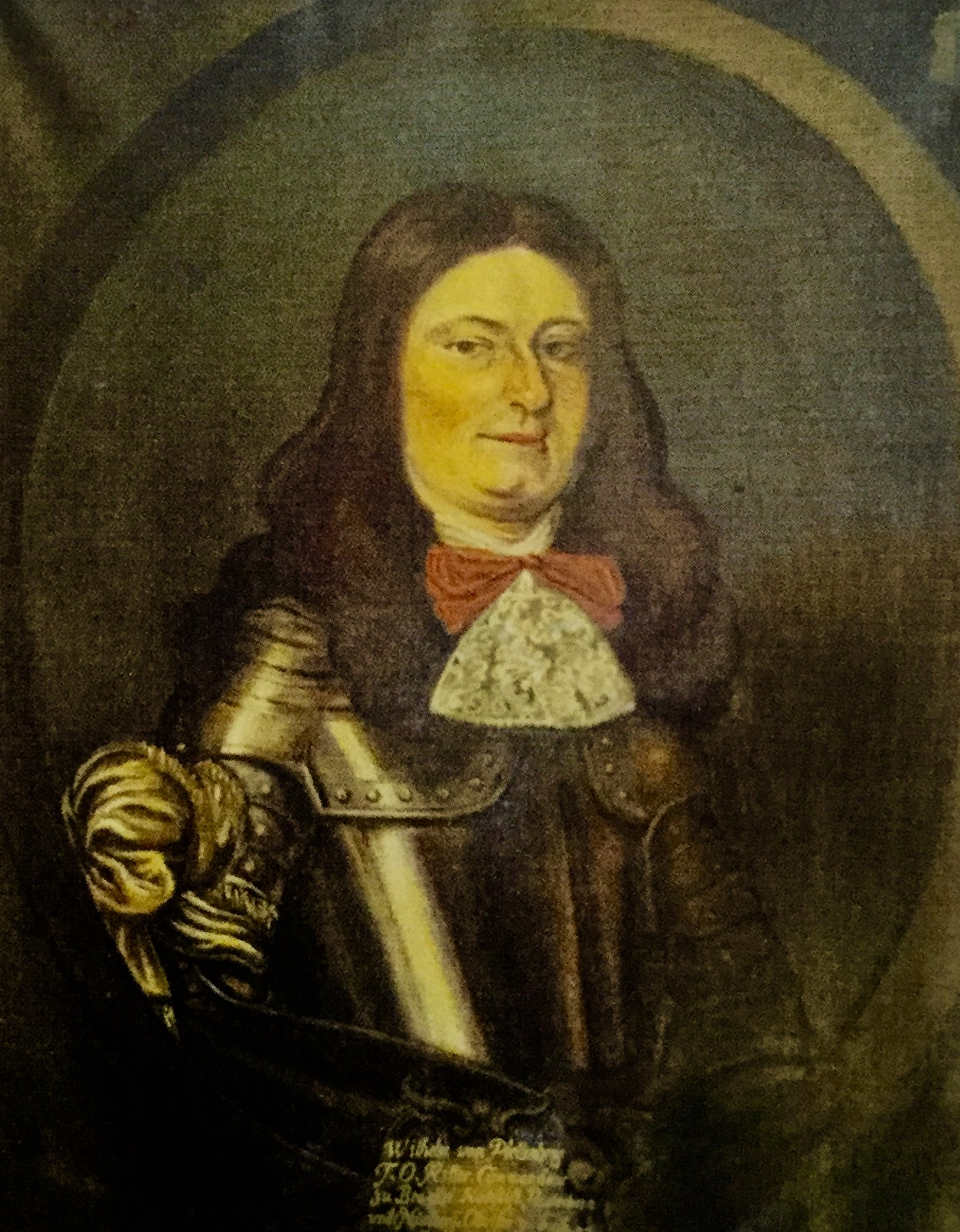 Wilhelm von Plettenberg-Lenhausen (gest. 1711) Komtur der Landkommende Mühlheim